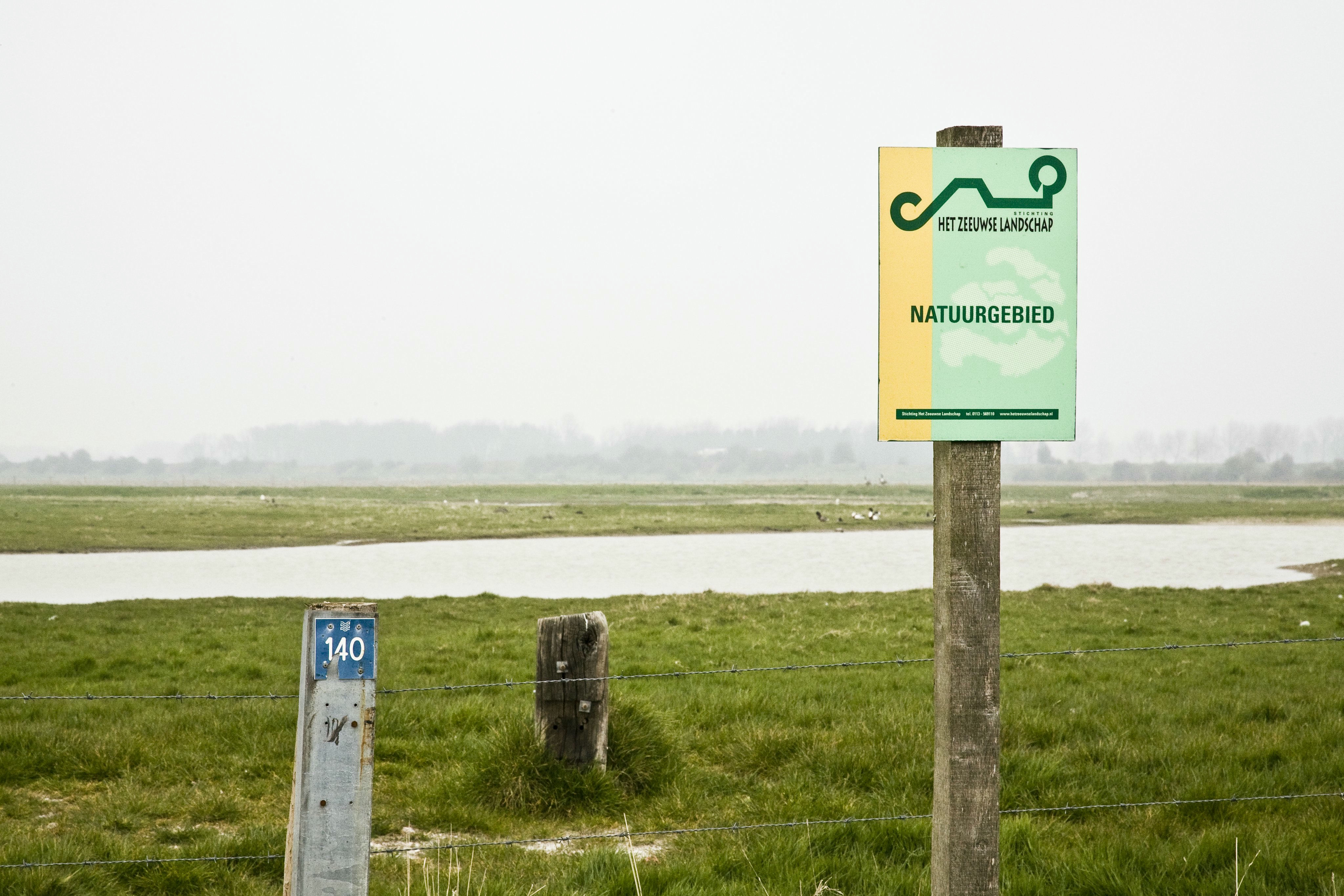 Cultuurlandschap: Overzicht weiland, natuurontwikkeling in het kader van de Ecologische Hoofdstructuur (opmerking: Gemaakt voor presentatie over vliedbergen in Zeeland)